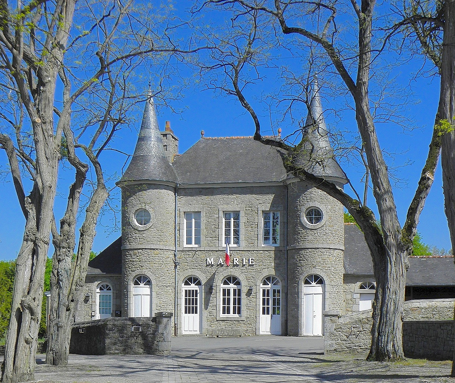 Mairie de Bobital (22).